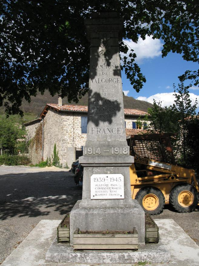 Monument aux morts de Valgorge